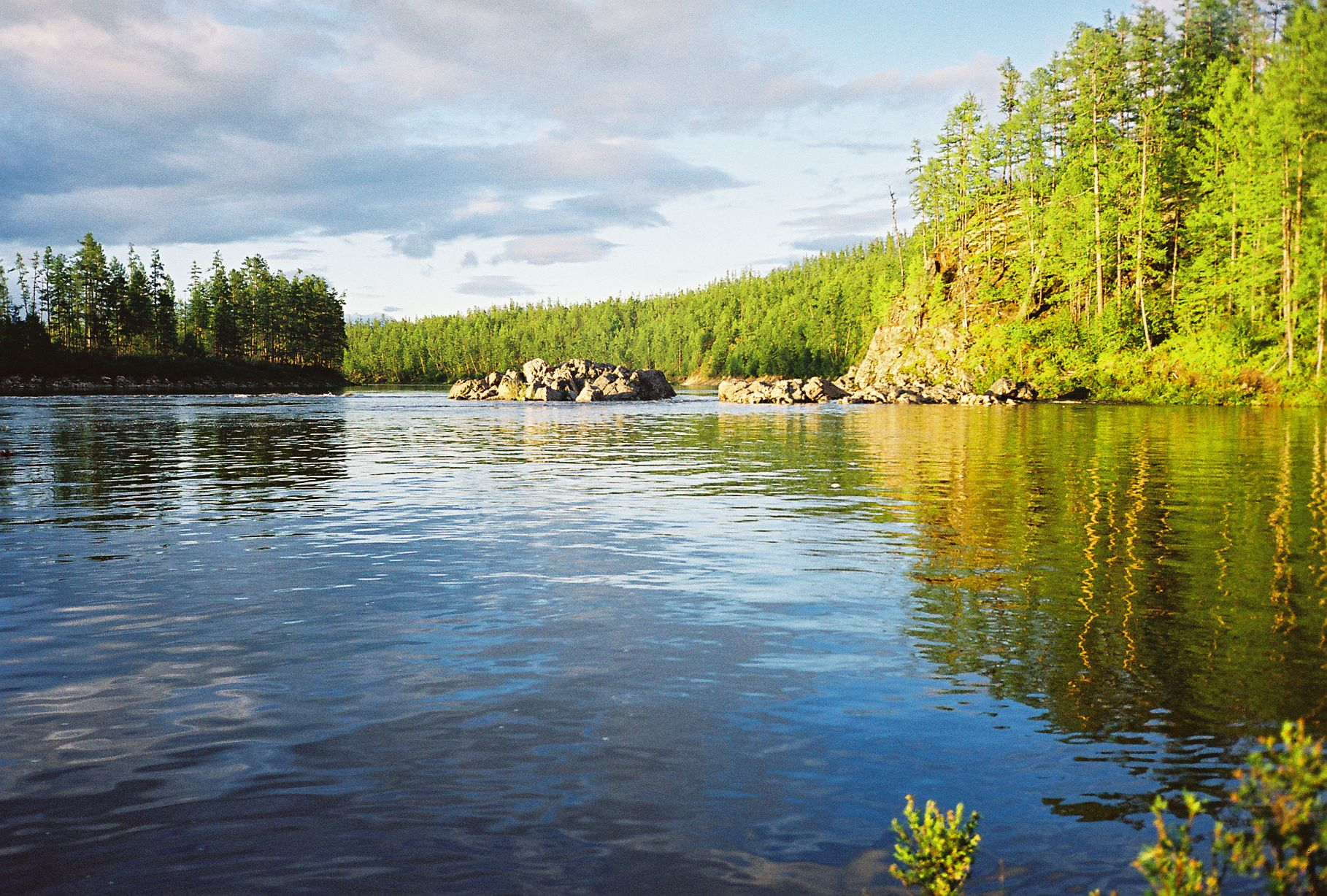 плёс